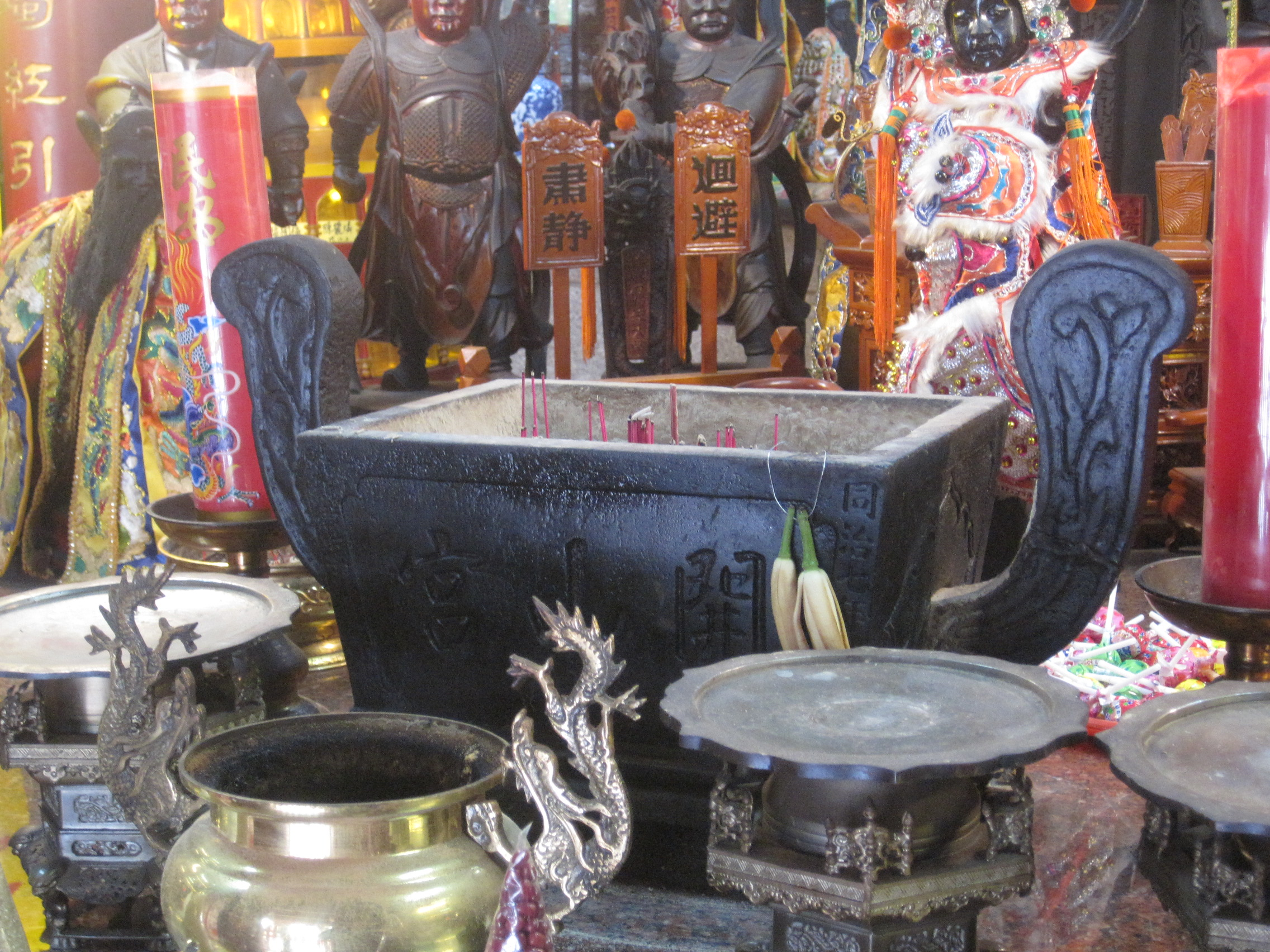 開基開山宮古香爐